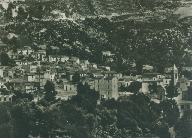 Autore: Fabrizio Muggianu, fonte: Caterina Puddu, Fotografia di Triei nei primi anni del '50, licenza cc-by.